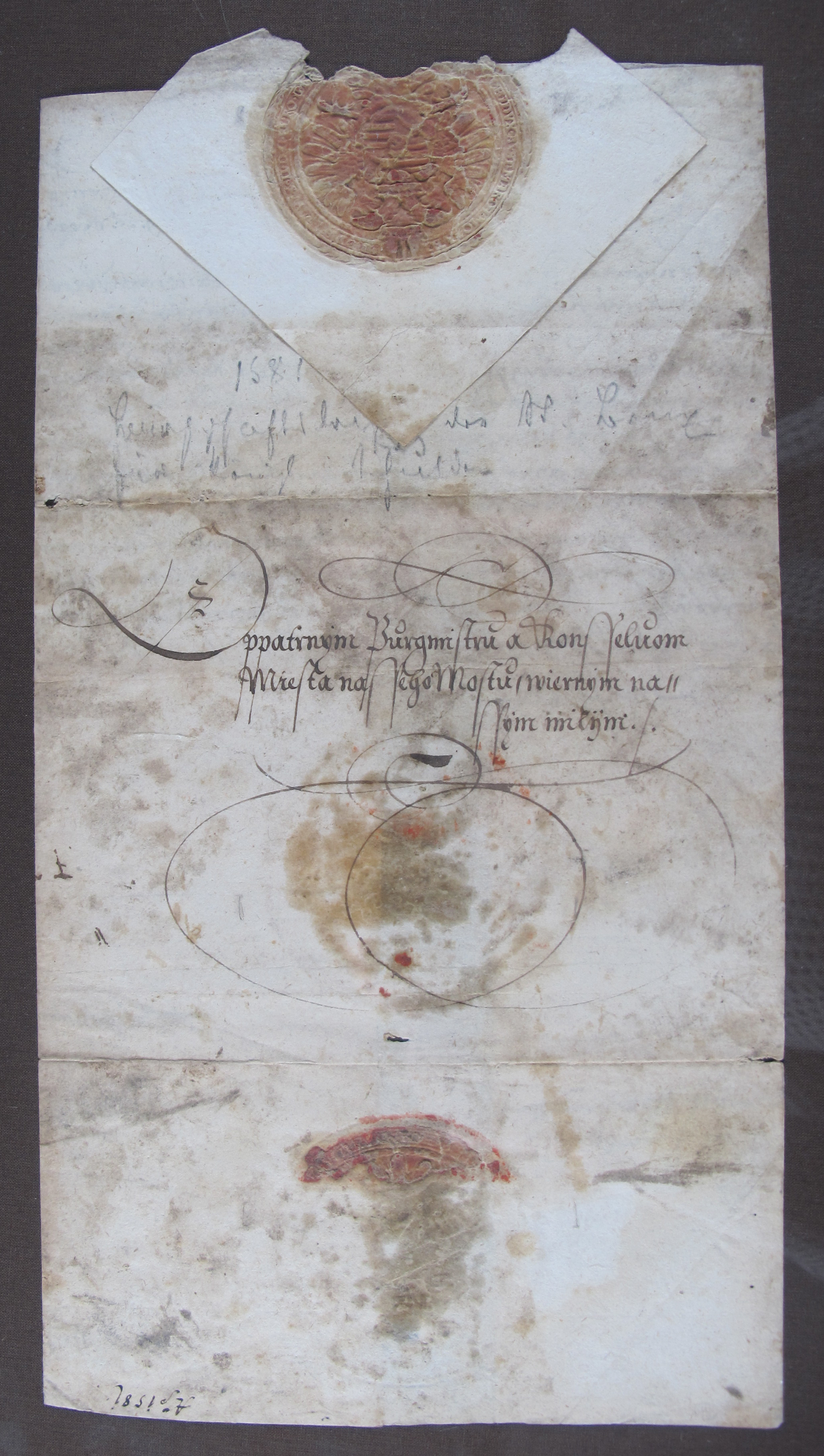 Dorsum listiny s adresou: Opatrným purkmistru a konšeluom města našeho Mostu věrným milým a panovnickou uzavírající pečetí.4. dubna 1603 Císař Rudolf II. určuje purkmistra a konšele města Mostu za spoluručitele svého dluhu 17.000 kop míšeňských grošů u Jindřicha z Písnice na Hartenbachu a Šenbachu.